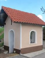 Na sliki je kapelica na Telčah